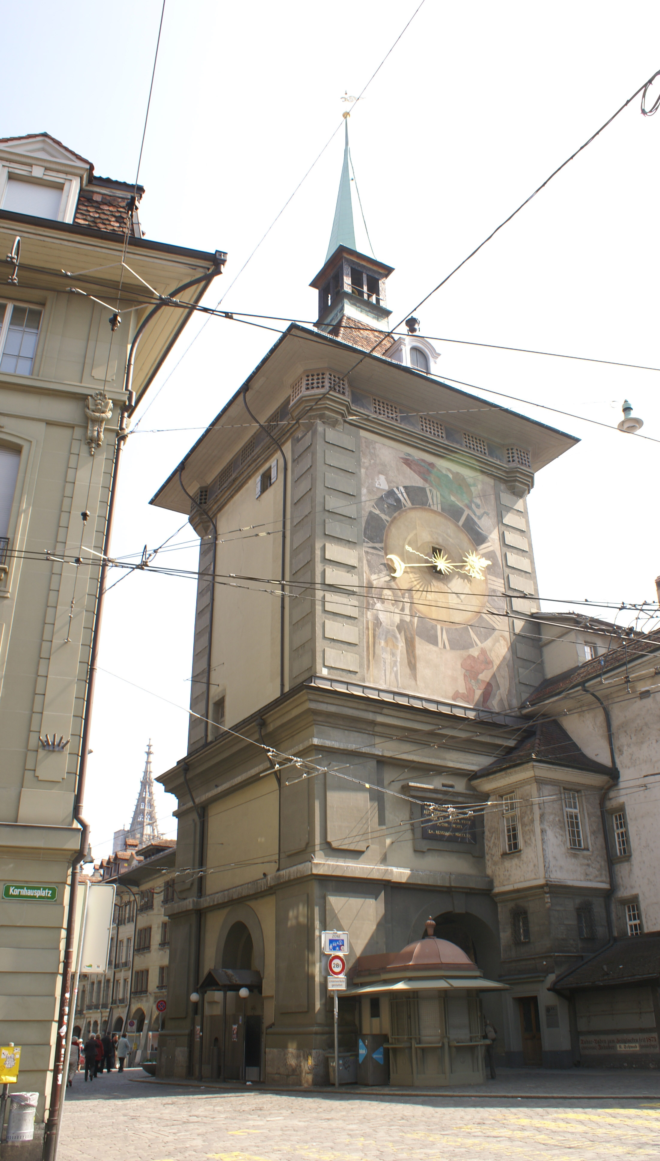 Zytglogge tower in Bern, Switzerland. North/west façade.